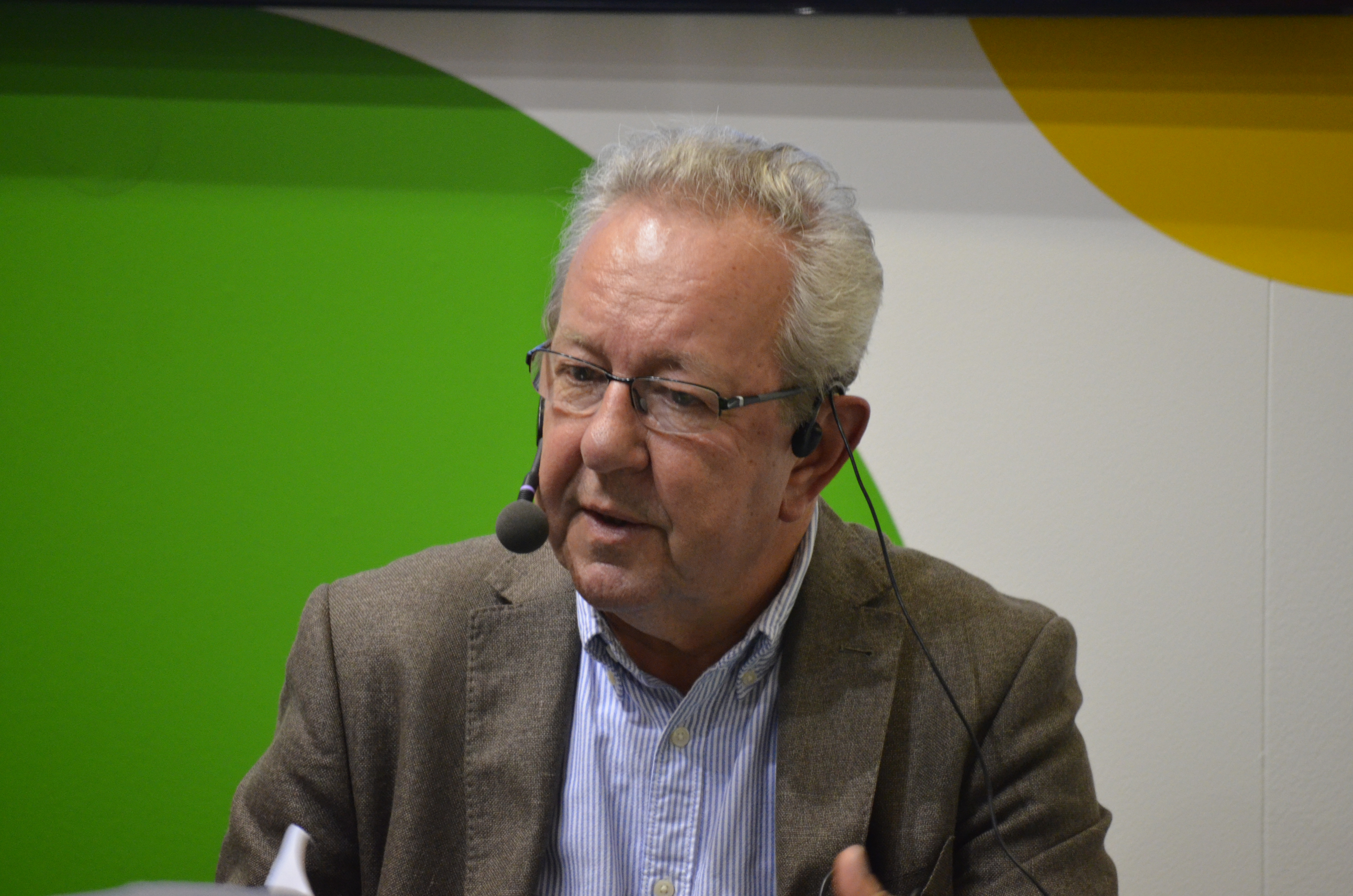 Bernt Gustavsson 2017 Bokmässan Göteborg